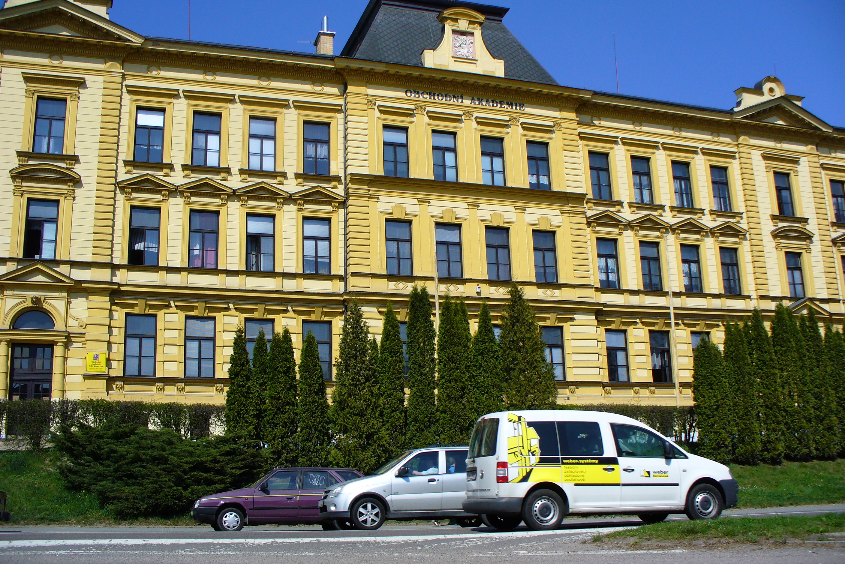 vstupni pohled na OA